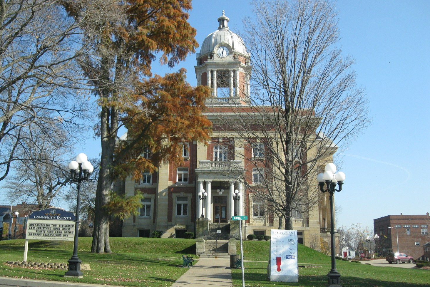 US Route 62 - Pennsylvania